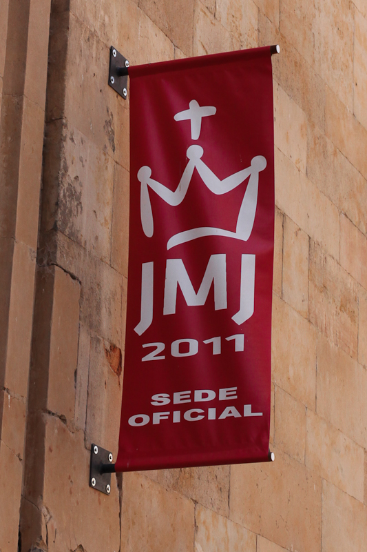 Jornadas Mundiales de la Juventud 2011